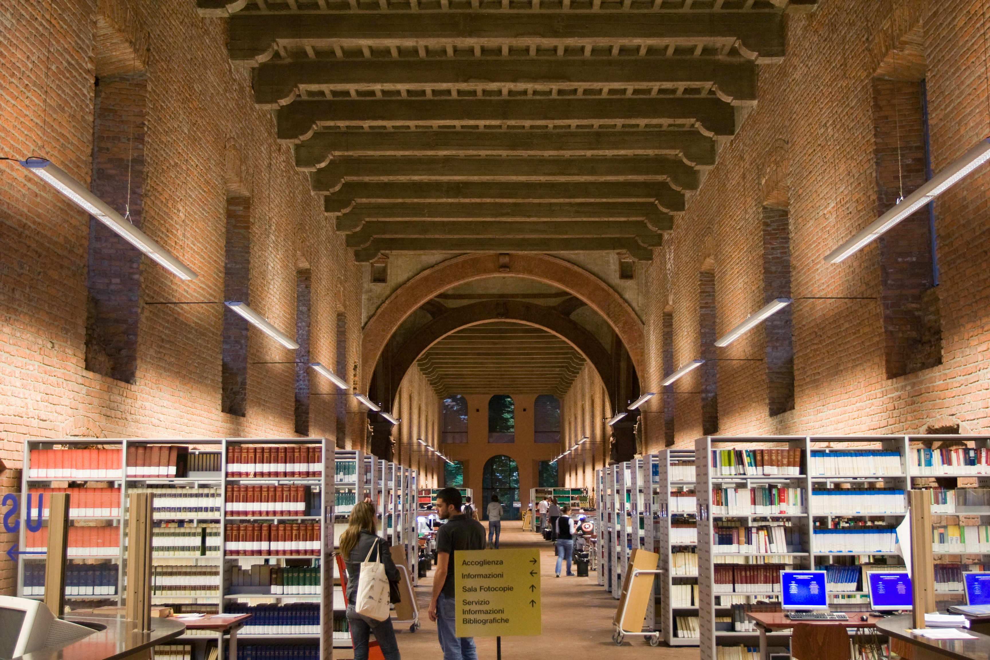 Universita` Statale